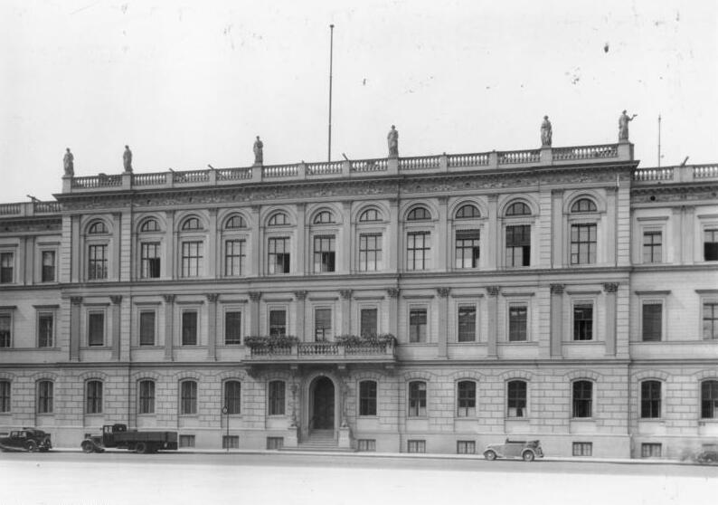 ADN-ZB/Archiv Berlin, August 1937 Das Reichsverkehrsministerium am Wilhelmplatz, 10795 - 37